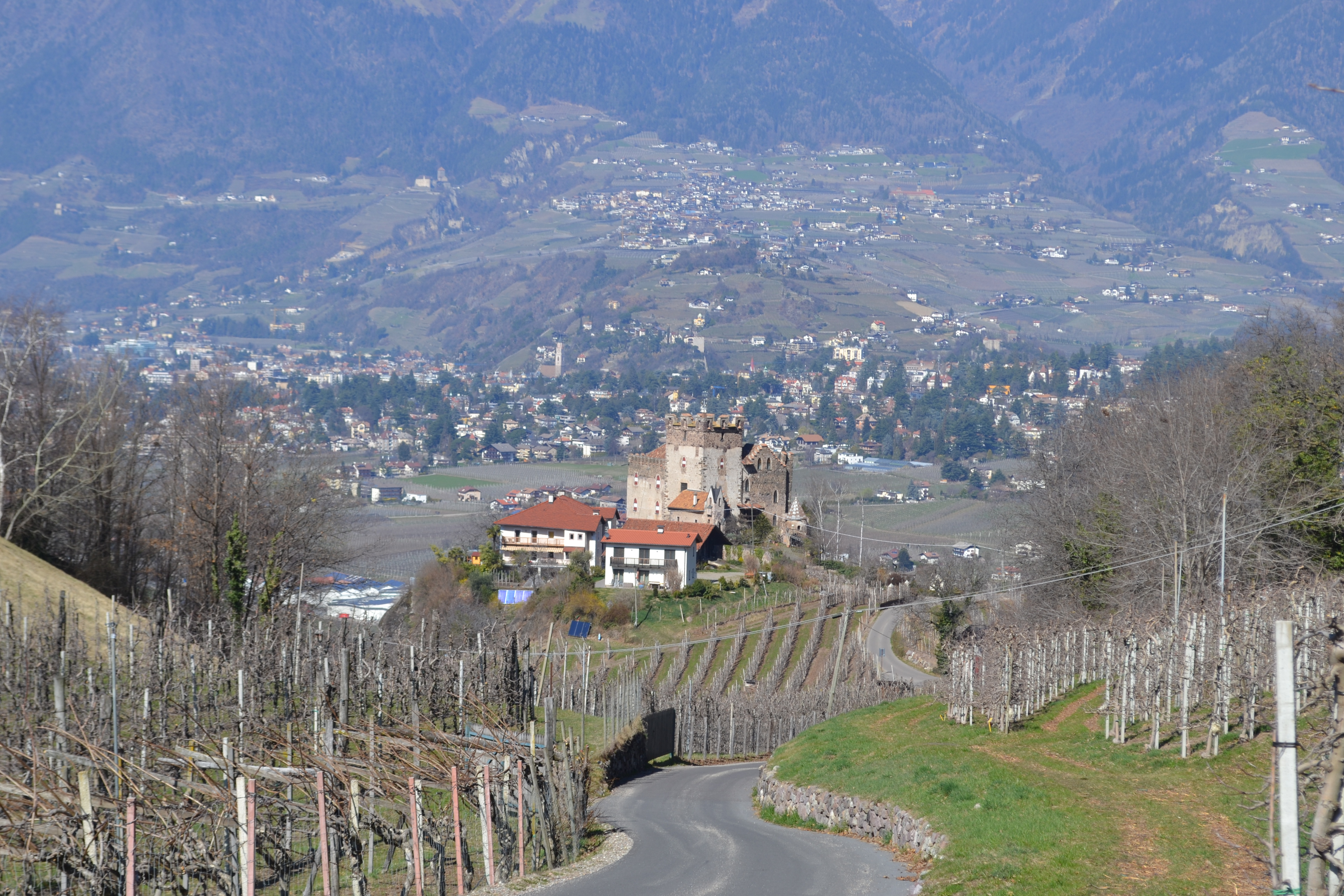 Schloss Katzenstein und im Hintergrund die Stadt Meran